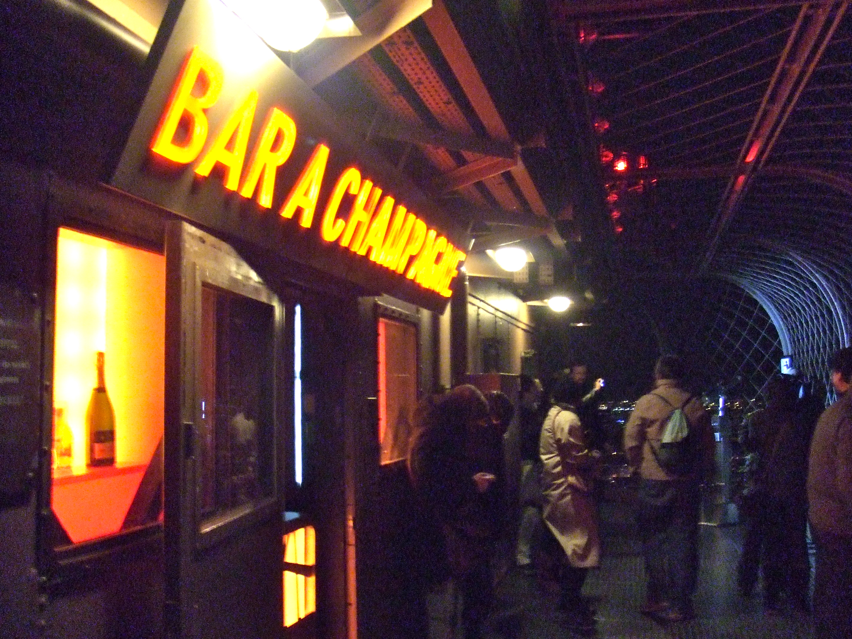 bar à champagne au 3e étage de la tour eiffel .